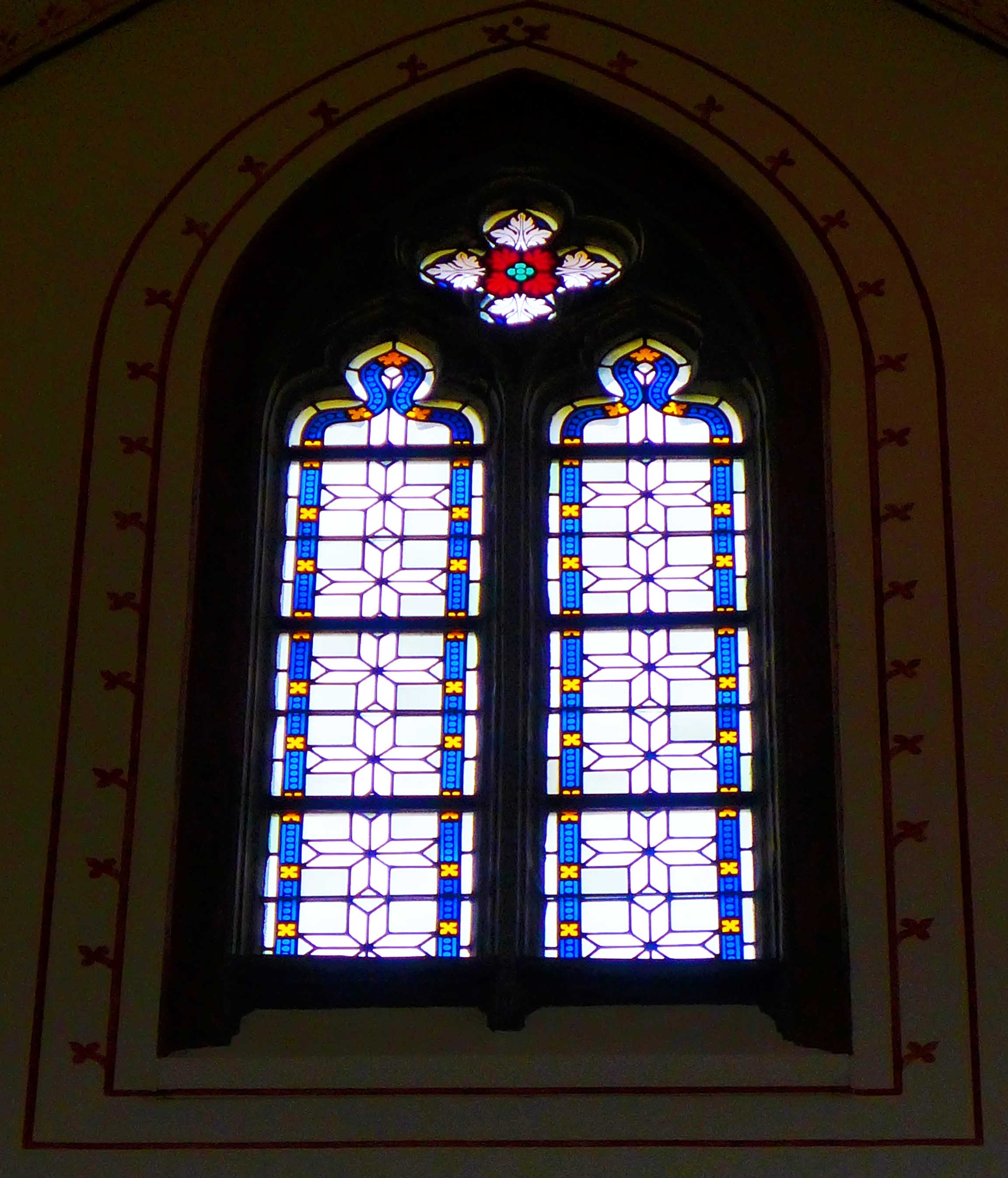 St. Katharina (Wallerfangen), Obergadenfenster